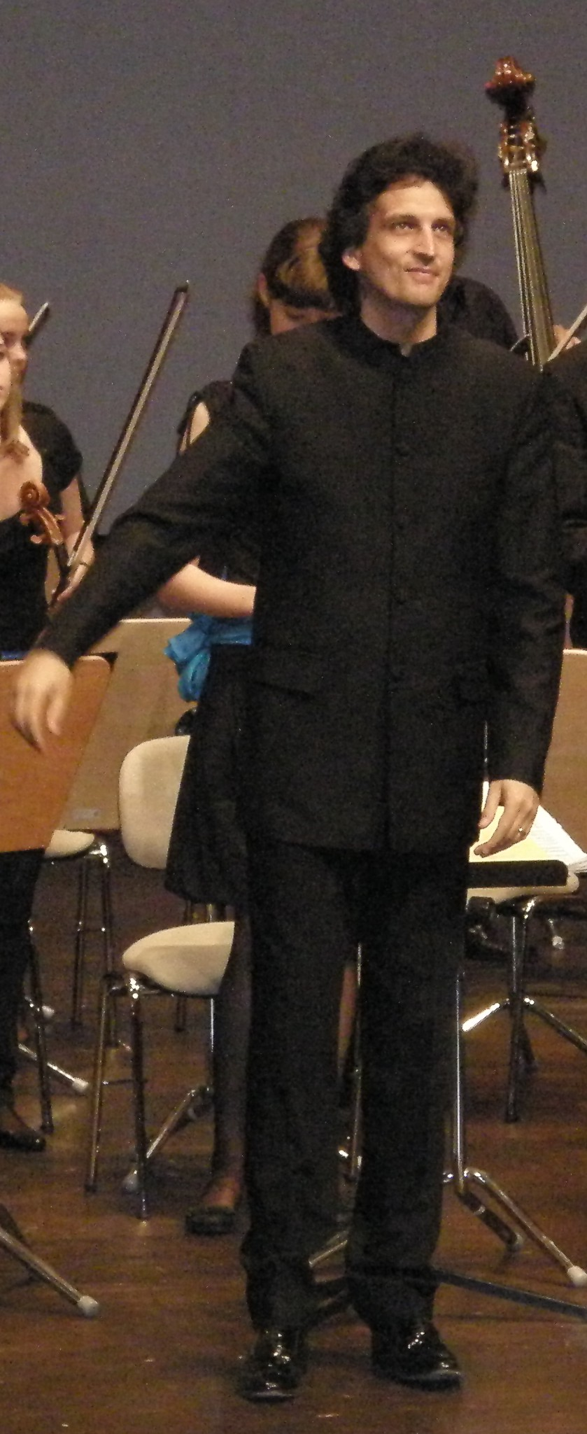 Potsdam, Nikolaisaal, Konzert; Michael Sanderling